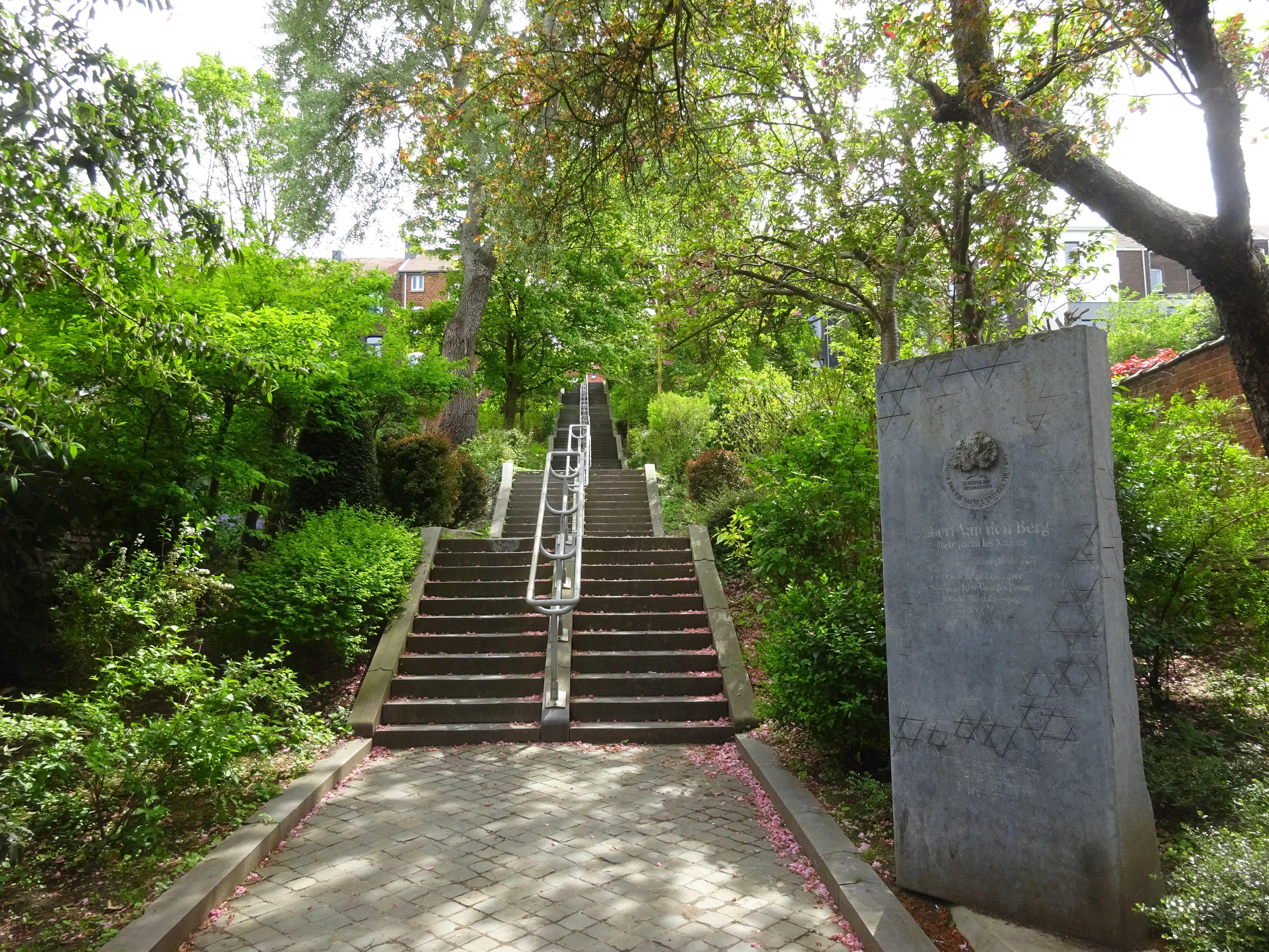 Passage Albert Van den Berg et stèle commémorative, Laveu, Liège